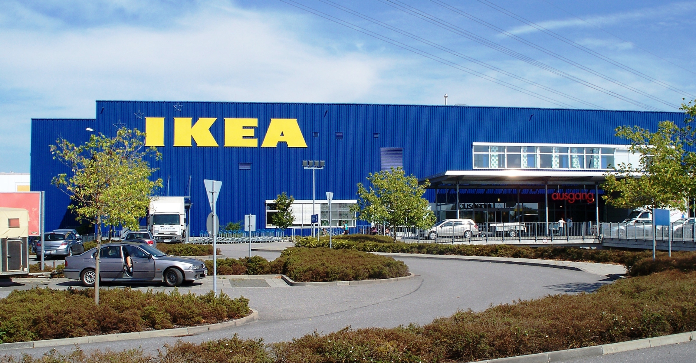 IKEA in Regensburg.